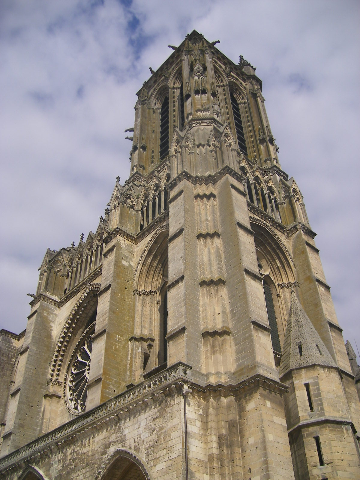 Cathédrale Saint-Gervais-et-Saint-Protais de Soissons